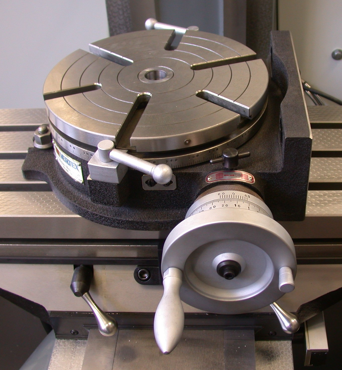 Drehbarer Winkeltisch für Fräs- und Schleifmaschinen.